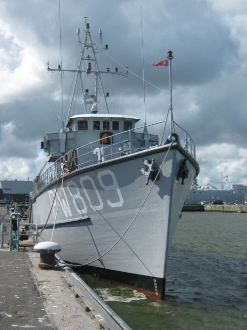 PW809 Naaldwijk